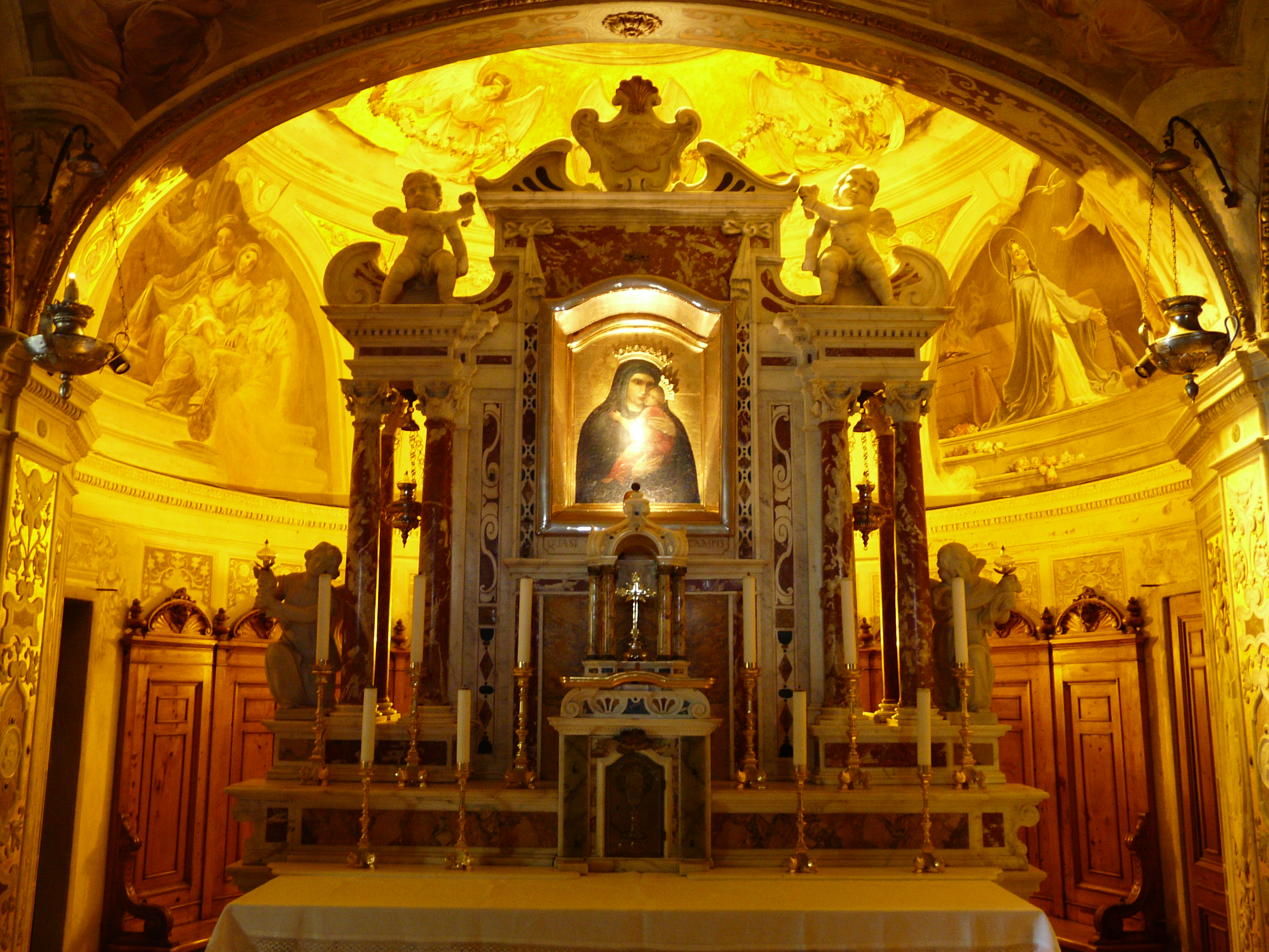 Santuario della Madonna dell'Olivo, Chiavari, Liguria, Italia